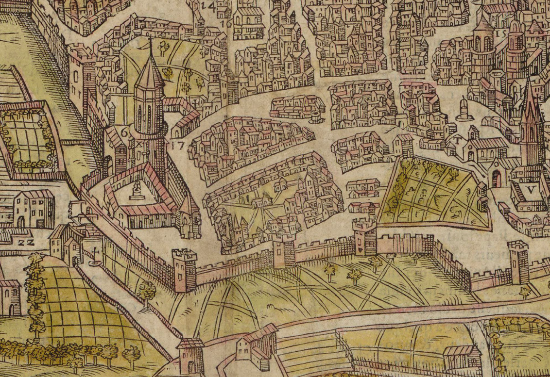 Partie Sud-Ouest de la ville d'Aix-en-Provence en 1575. Le couvent des Augustins se trouve à gauche de l'image, abrité derrière les remparts et la porte des Augustins.